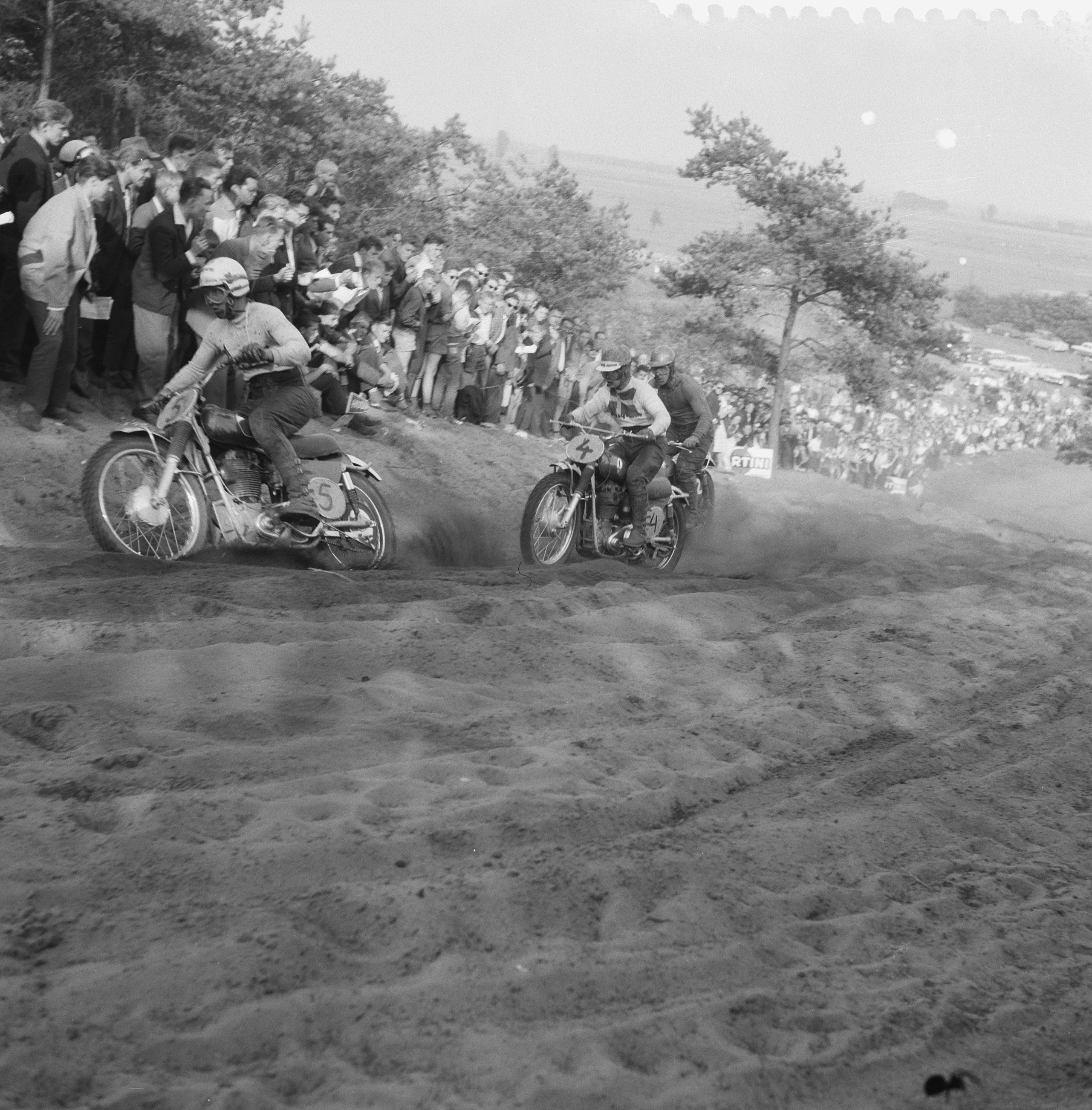 Collectie / Archief : Fotocollectie Anefo Reportage / Serie : [ onbekend ] Beschrijving : Grand Prix Motor Cross in Bergharen Datum : 24 juli 1960 Locatie : Bergharen Fotograaf : Behrens, Herbert / Anefo Auteursrechthebbende : Nationaal Archief Materiaalsoort : Negatief (zwart/wit) Nummer archiefinventaris : bekijk toegang 2.24.01.03 Bestanddeelnummer : 911-4499 Reacties Geplaatst door Hans Nabuurs op 26 augustus 2011 - 17:22. Het is heel erg jammer dat zo'n groots evenement hier niet meer georganiseerd mag worden op deze unieke lokatie. Bergharen was toen ter tijd wereldberoemd en nu is het zijn bekendheid kwijt en men is naar mijn inzien niets opgeschoten met het sluiten van dit prachtige circuit.